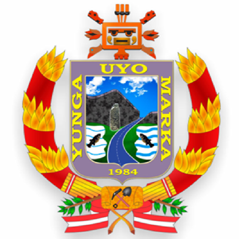 Escudo Yunguyo